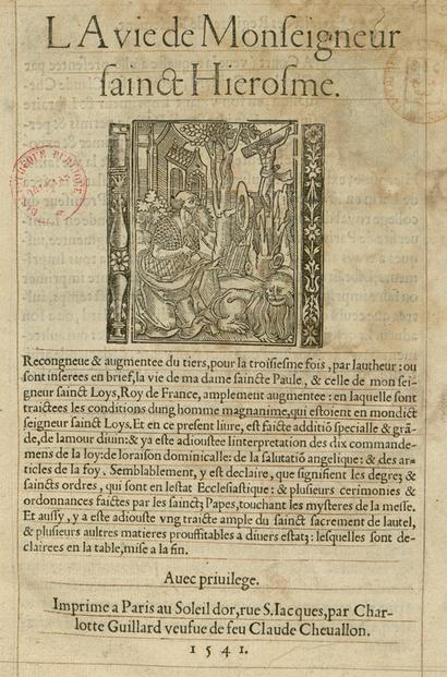 Première page de La Vie de monseigneur sainct Hierosme de Louis Lasseré, Imprimé à Paris au Soleil d'Or, rue S[aint] Jacques, par Charlotte Guillard, veufve de feu Claude Chevallon. 1541. in-2°